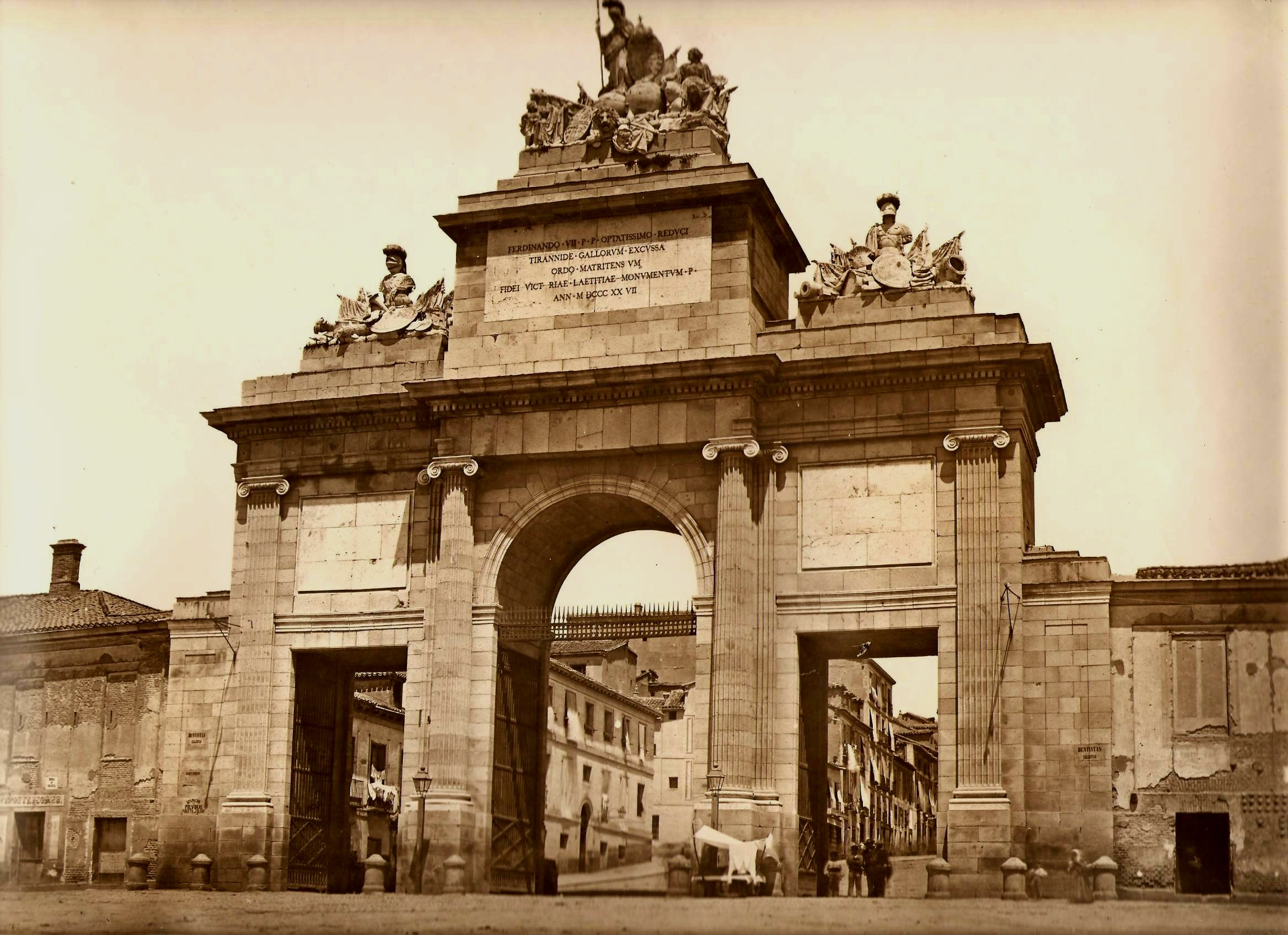 La Puerta de Toledo de Madrid unida a la cerca que rodeaba la ciudad. Fotografía de J. Laurent (1865)